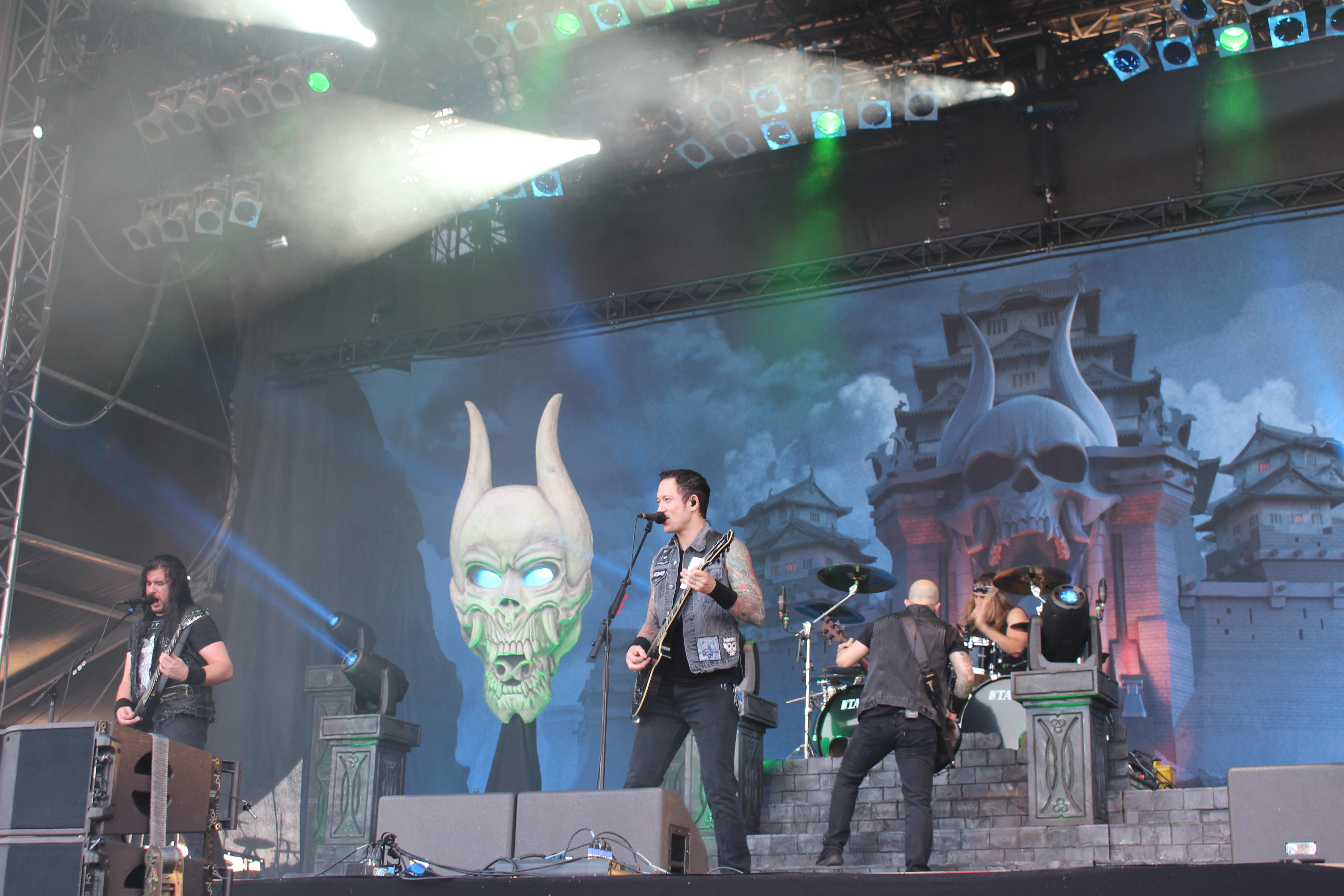 Festivalsommer This photo was created with the support of donations to Wikimedia Deutschland in the context of the CPB project "Festival Summer". Personality rights warningAlthough this work is freely licensed or in the public domain, the person(s) shown may have rights that legally restrict certain re-uses unless those depicted consent to such uses. In these cases, a model release or other evidence of consent could protect you from infringement claims.